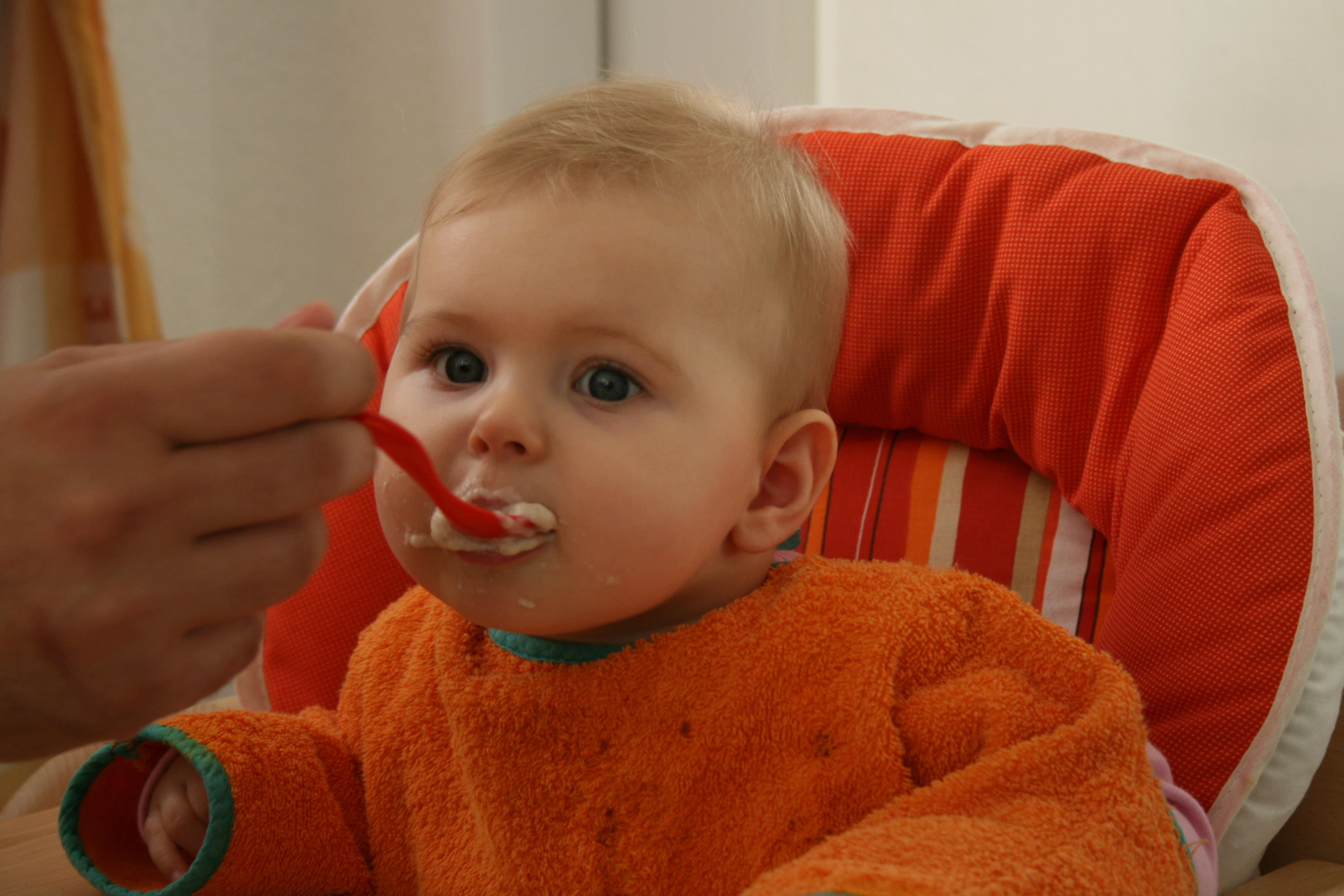 Baby beim füttern